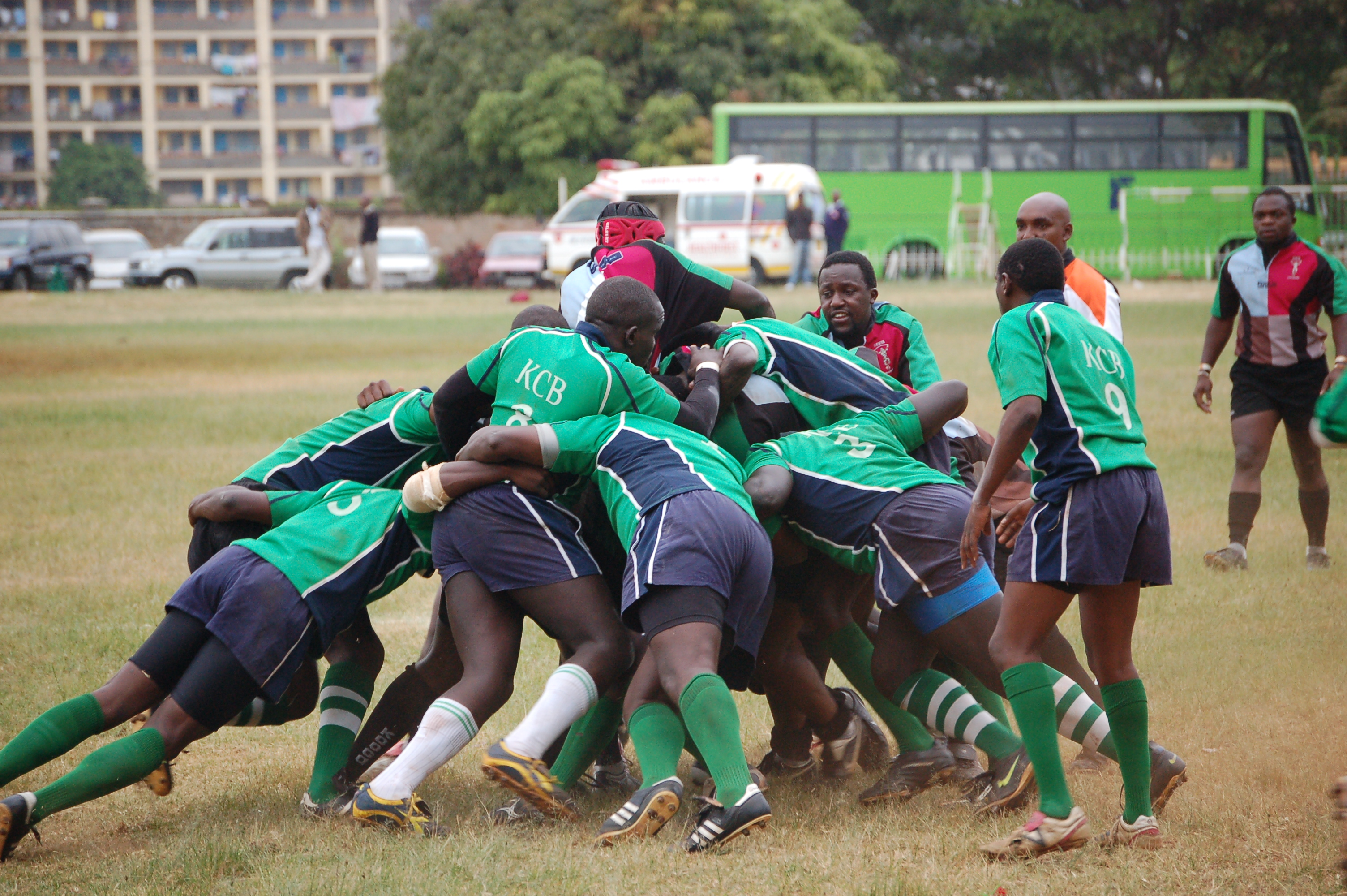 Forwards